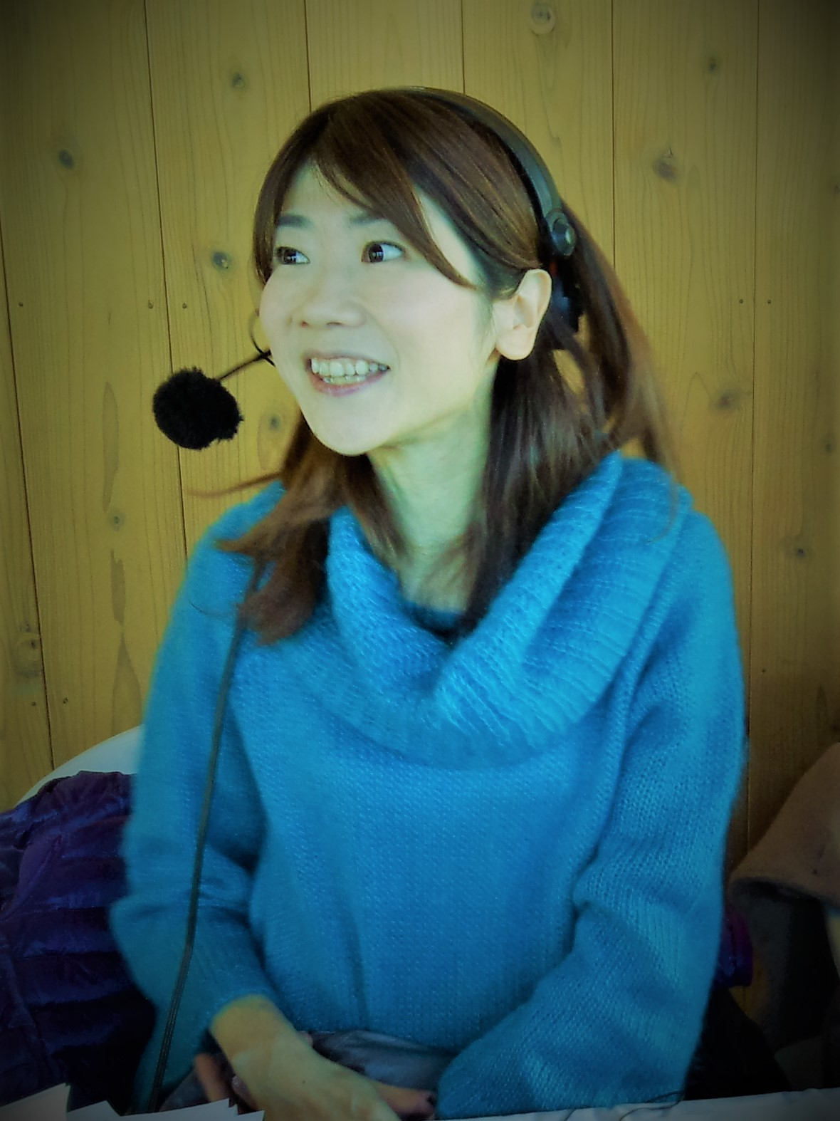 塚原まきこ 2013年